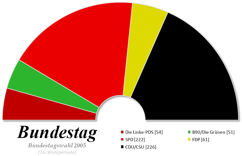 Projection graphique de la composition du 15ème Bundestag élu en 2005